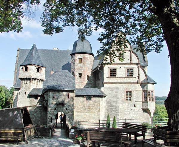 Kranichfeld, Oberschloss. Blick von der Vorburg auf die Burg